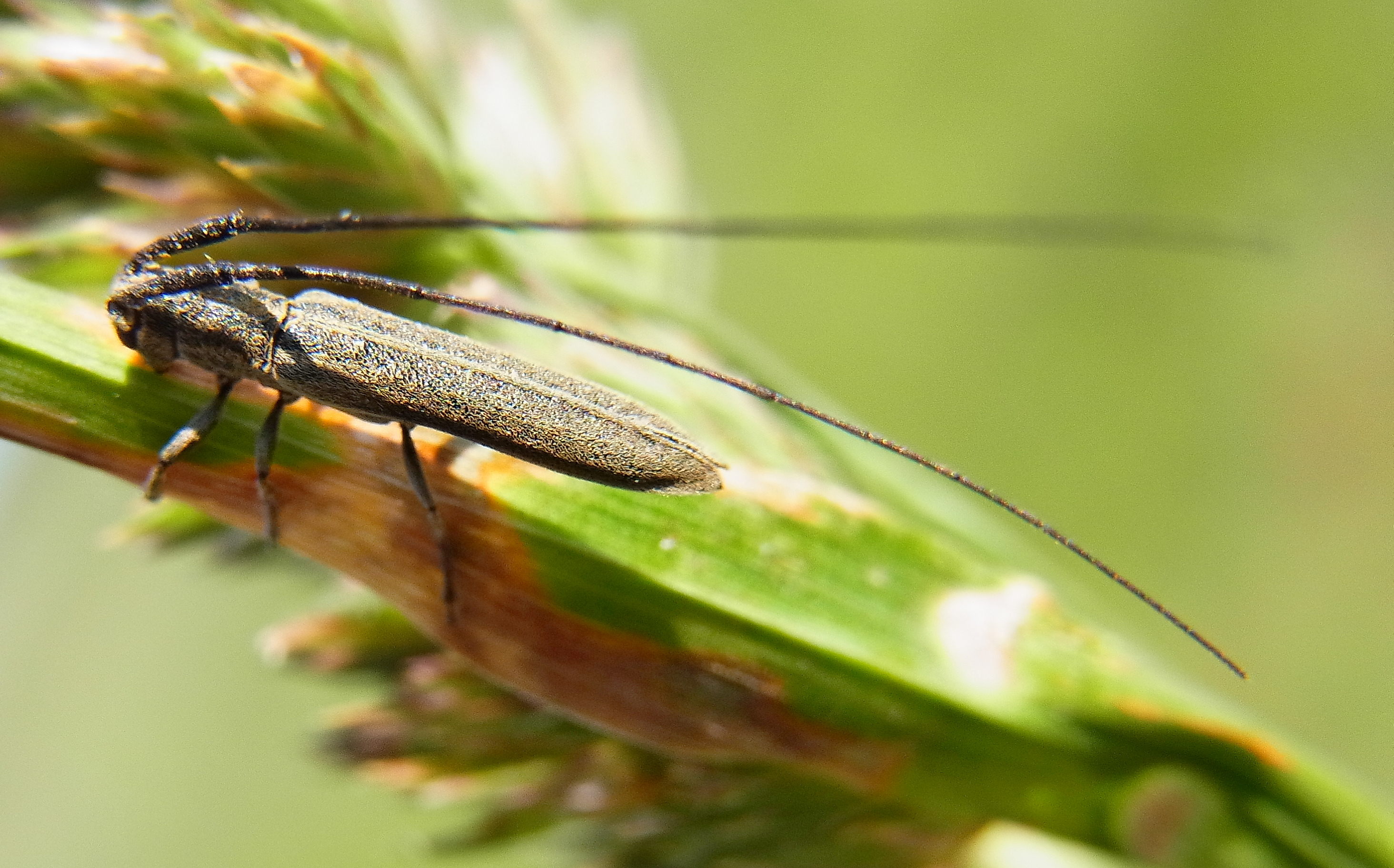 Calamobius filum aus Südungarn, Sós-tó bei Mórahalom auf Knäuelgras